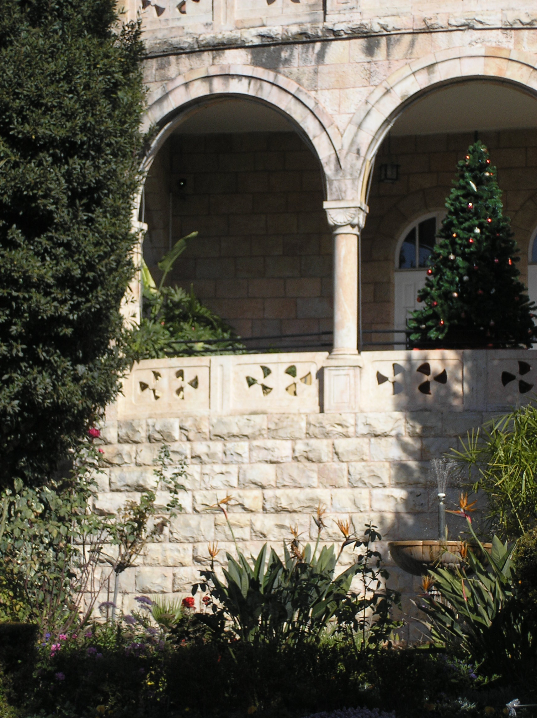 Vila Sherkessi